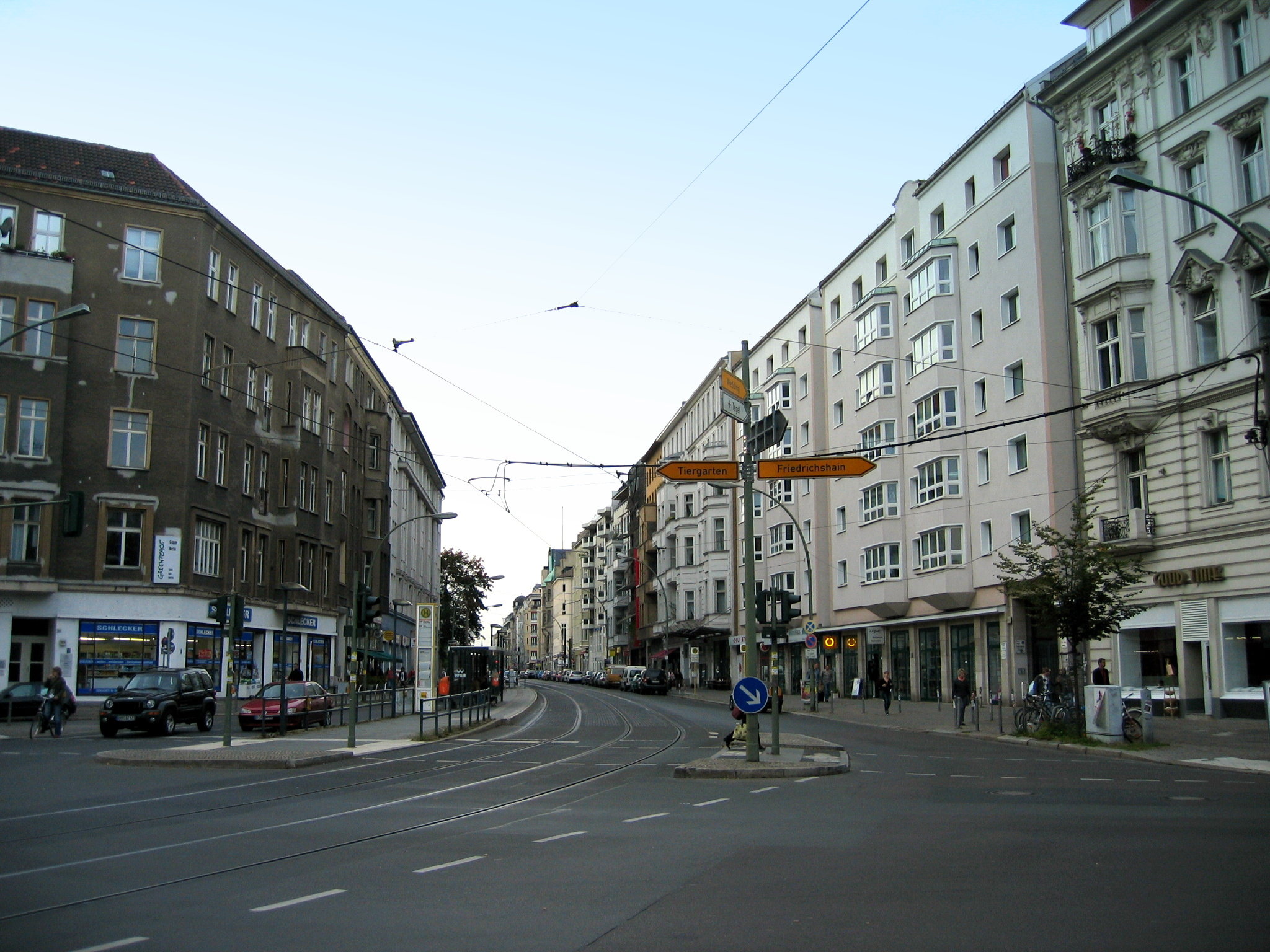 Chausseestraße, Berlin-Mitte